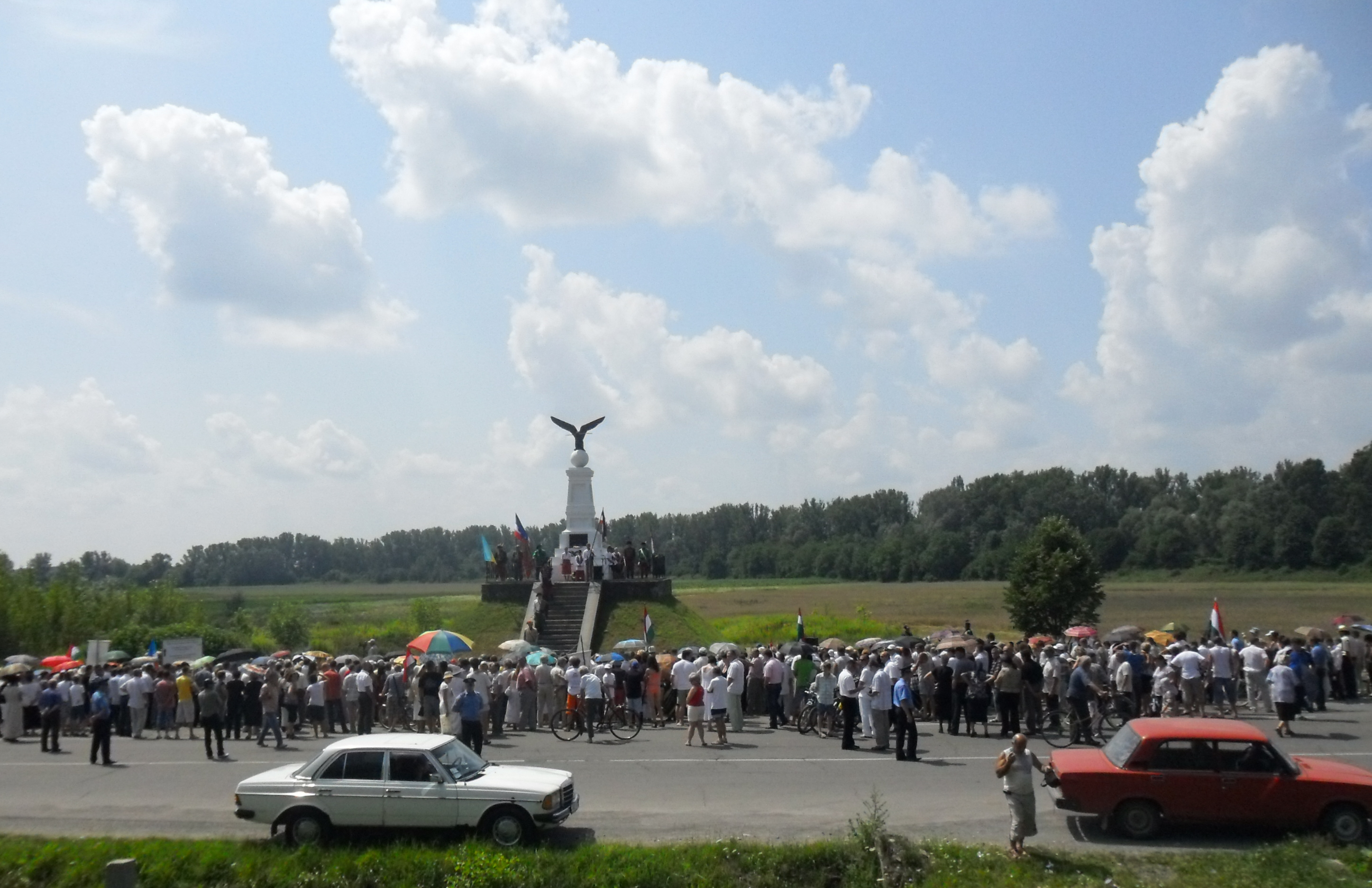 Turul 2011. Az ünneplő emberek sokasága Tiszaújlakon (Kárpátalja, Ukrajna)